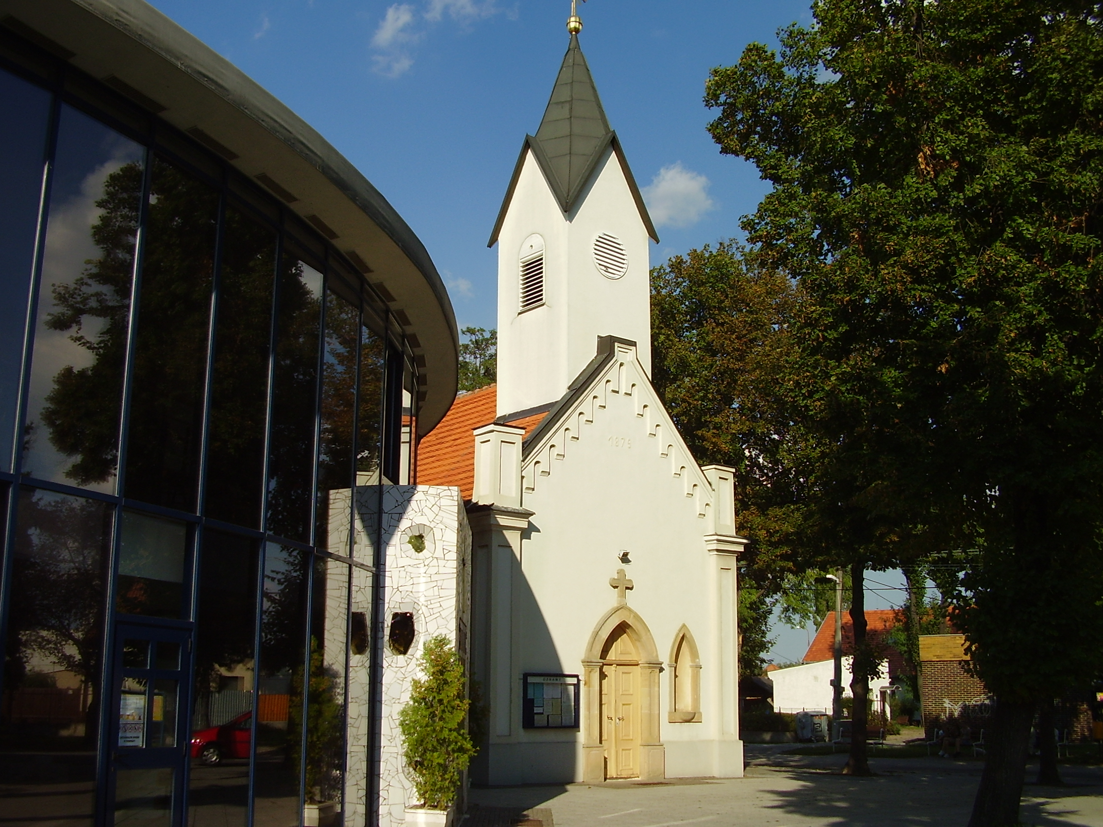 Bratislava